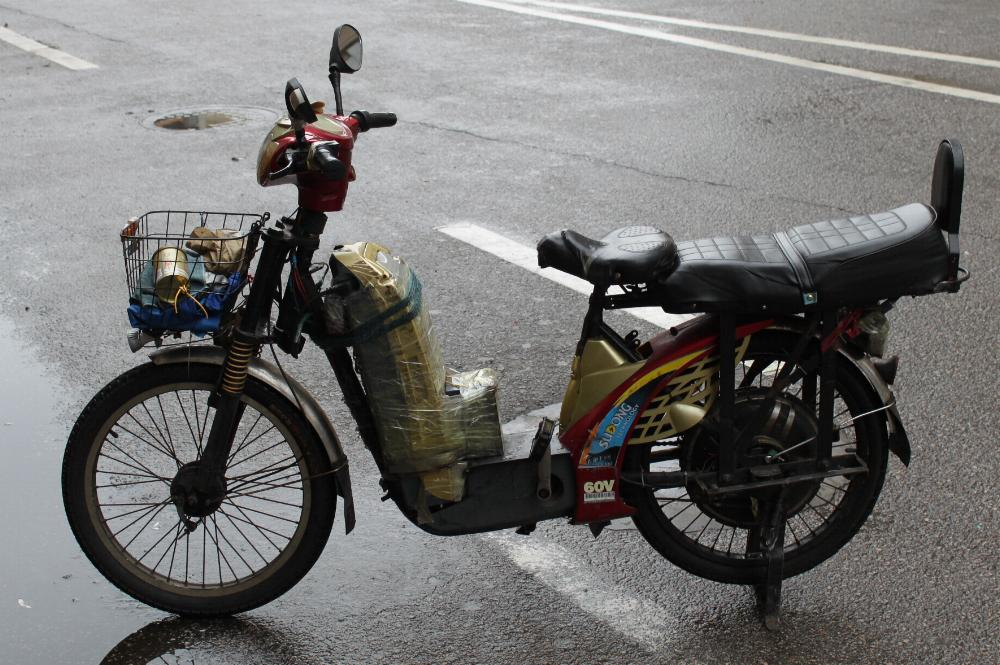 Shenzen E-Bike : 3 Sitzplätze, ausklappbare Trittbretter für die hinteren Fahrgäste. modifizierter Akku